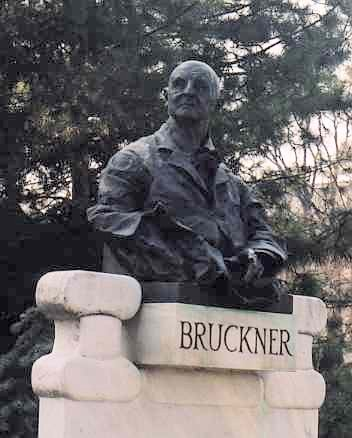 Anton Bruckner denkmal, Wenen. Eigen foto